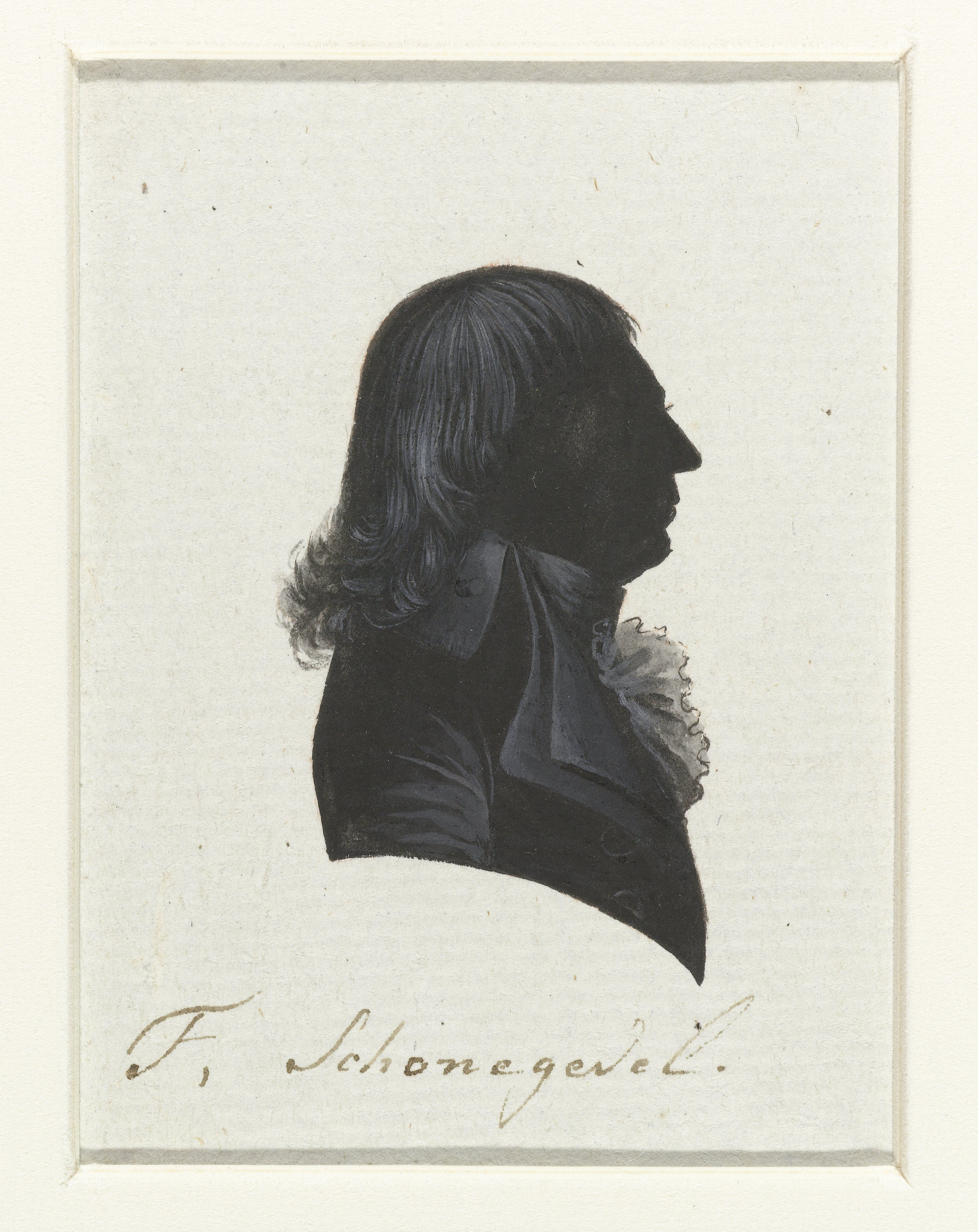 T. Schonegevel. Tekening in Oost-Indische inkt, waarschijnlijk gemaakt door Hausdorff. De tekening behoort tot een serie van portretten van afgevaardigden naar de Eerste Nationale Vergadering in 1796-1797. Van de serie werden gravures gemaakt die zijn afgedrukt in "Geschiedenis der staatsregeling, voor het Bataafsche volk", een boek van Cornelius Rogge (1799).